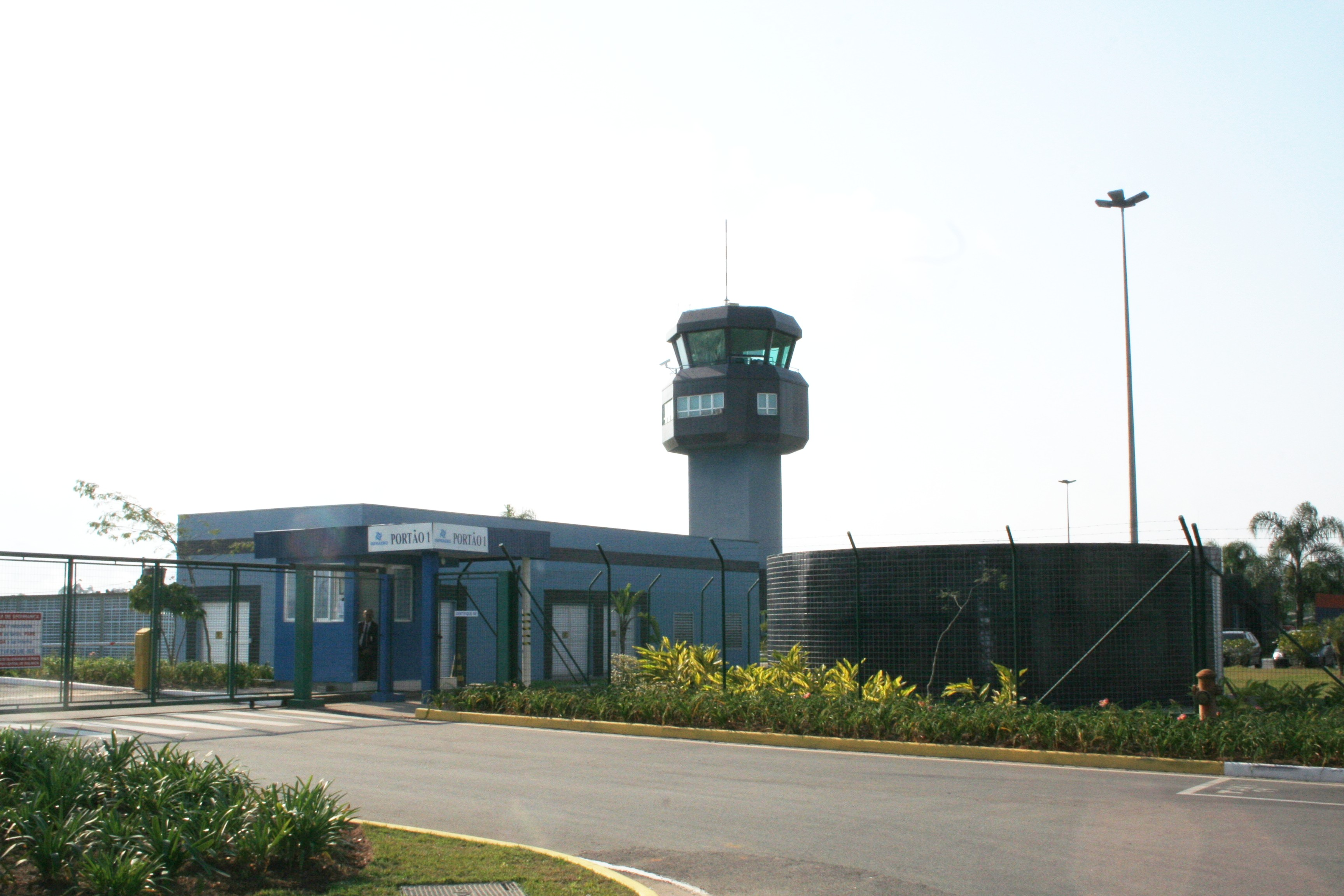 Joinville Airport.